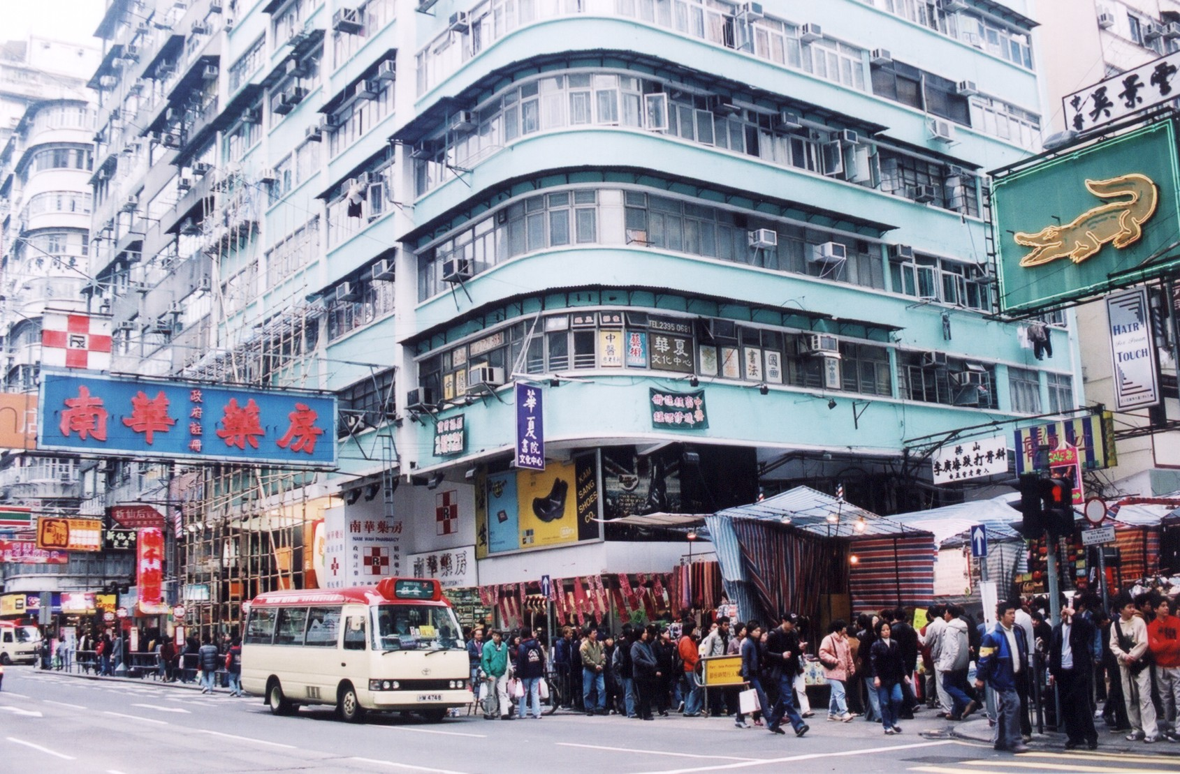 中文（香港）: 華夏書院位於通菜街的現址。